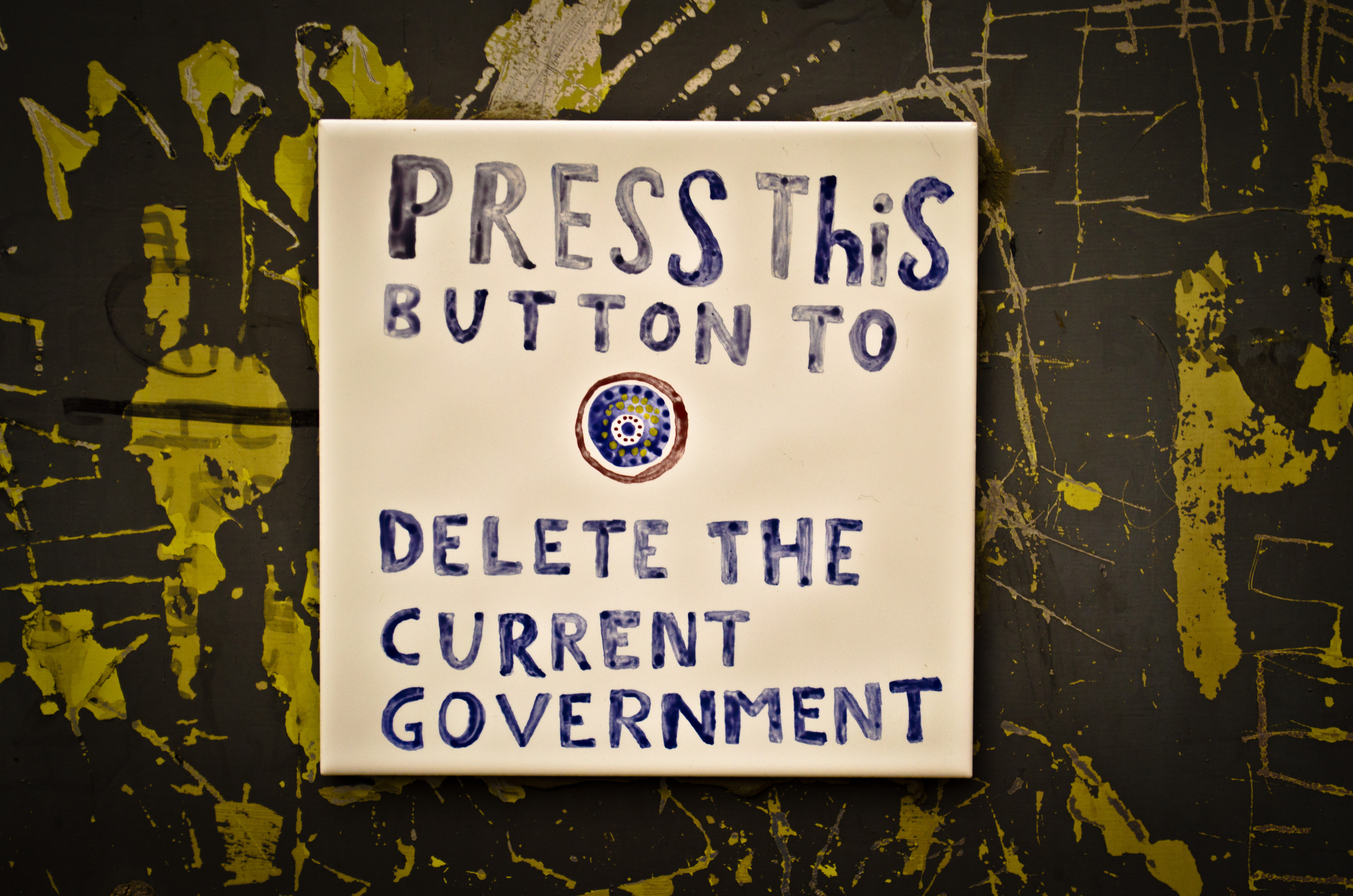 "Press this button to delete the current government" - Presiona este botón para borrar el actual gobierno. Imagen tomada en Lincoln's Inn Fields, Londres.